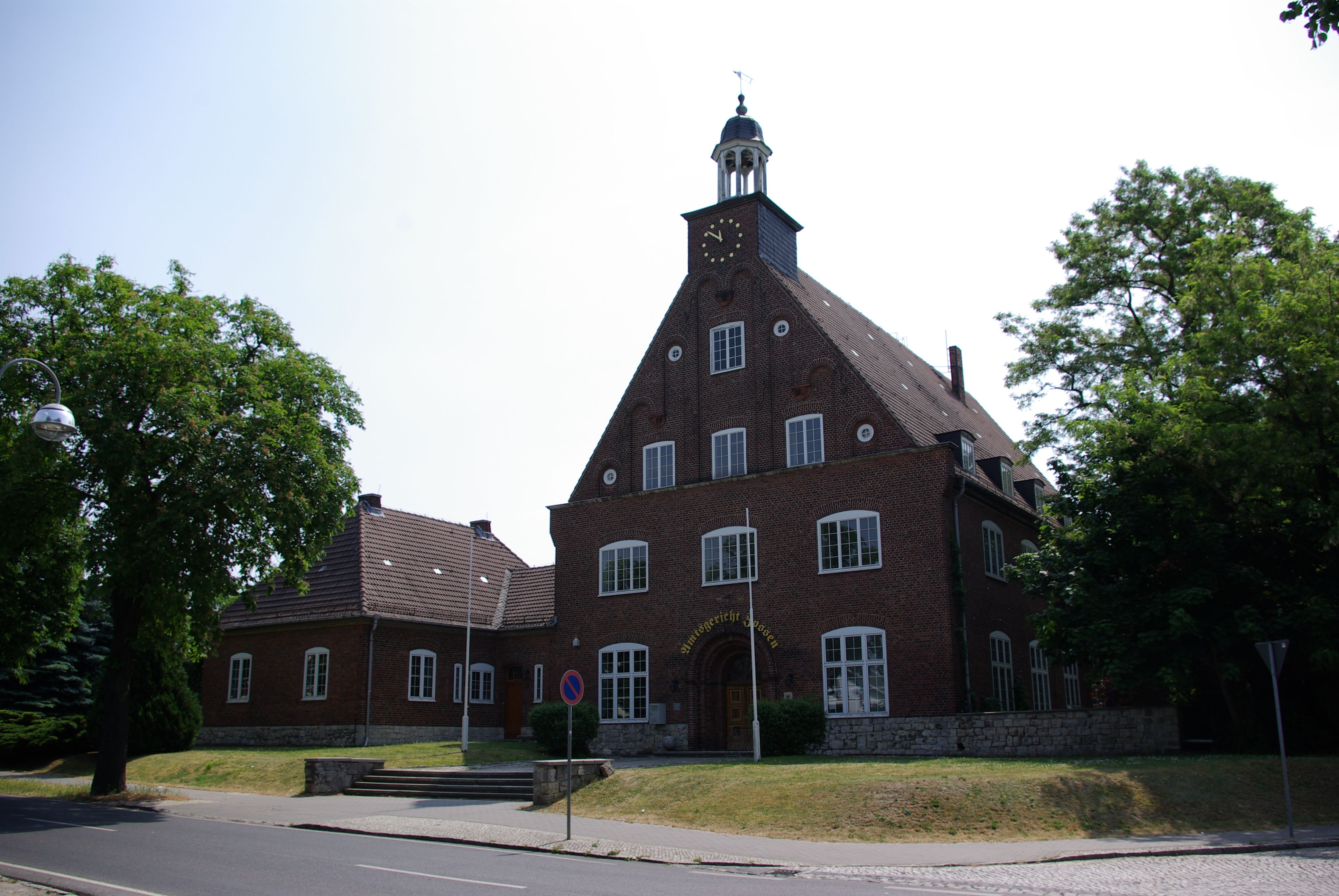 Zossen in Brandenburg. Das Amtgericht steth in der Gerichtsstraße in der Nähe des Wasserturms. Das Gebäude steht unter Denkmalschutz.